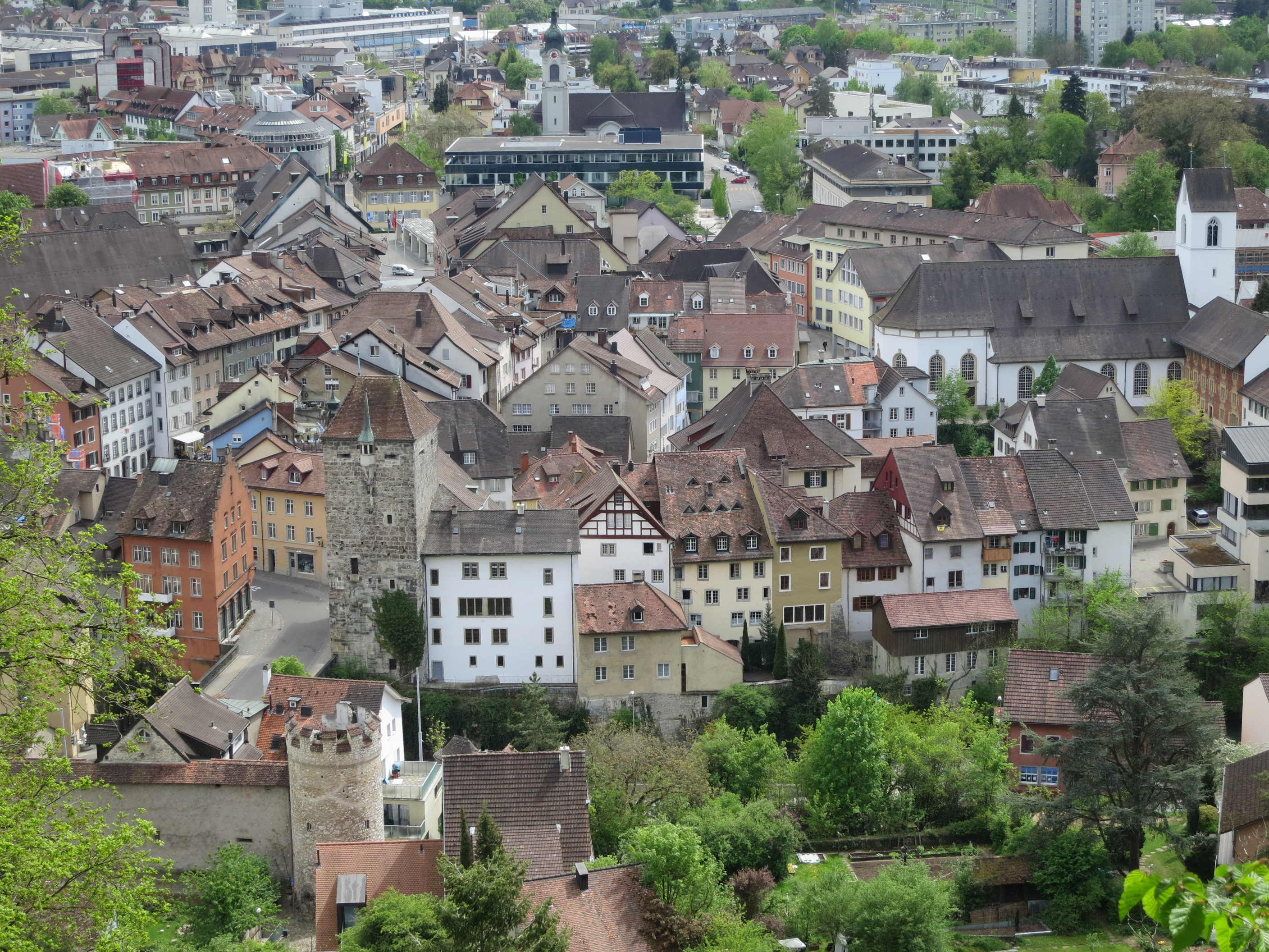 Brugg AG, Schweiz